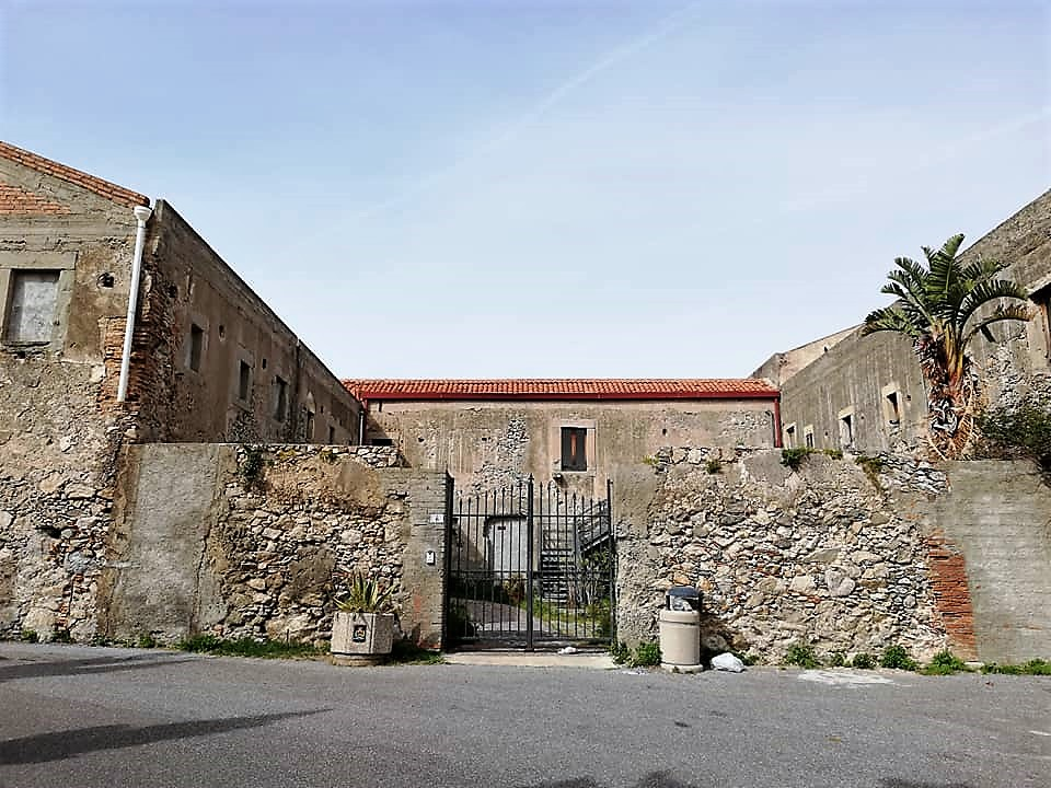 Chiesa di Santa Maria dell'Itria e convento dei Cappuccini.